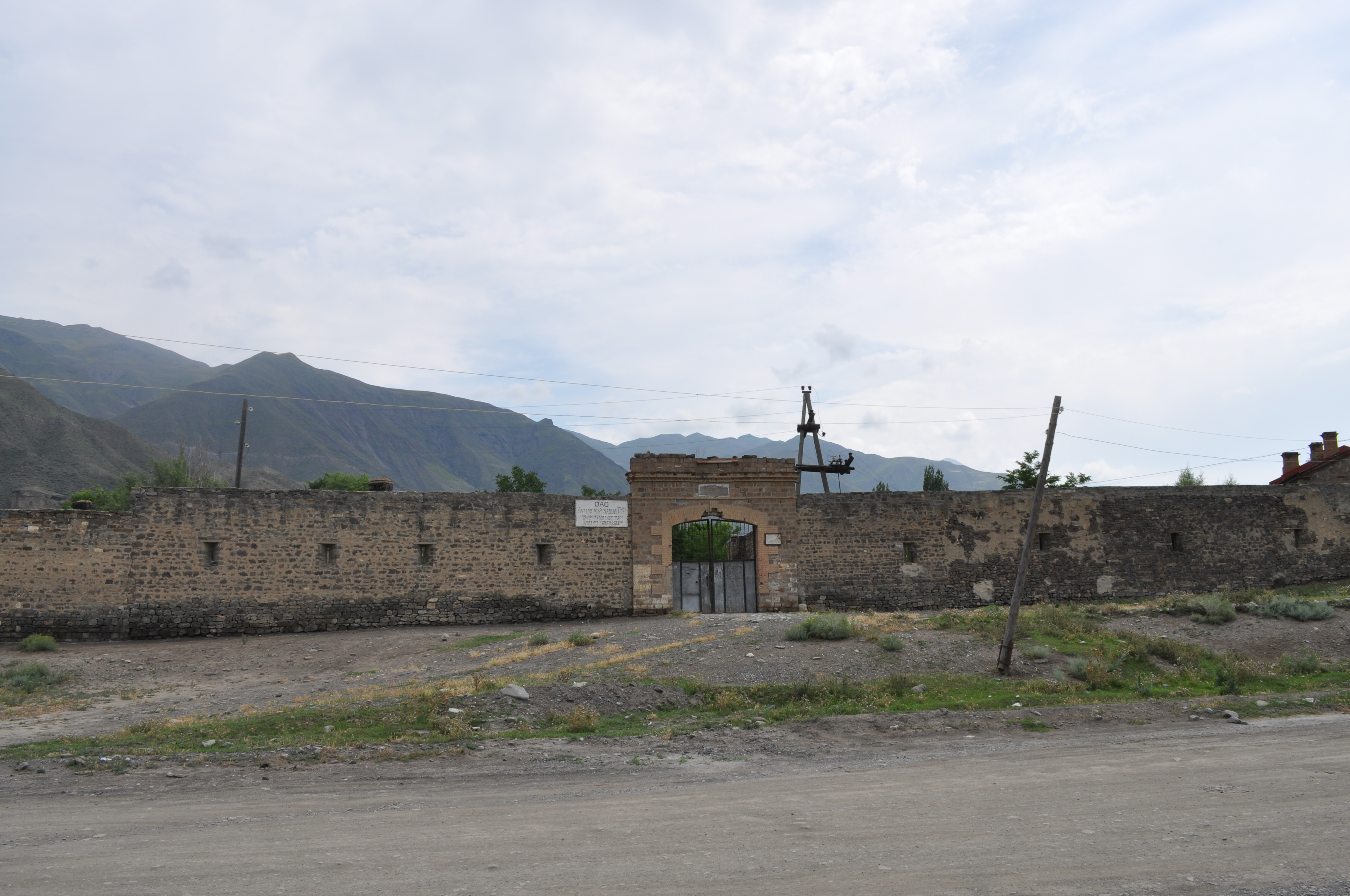 Ворота в Ахтынскую крепость